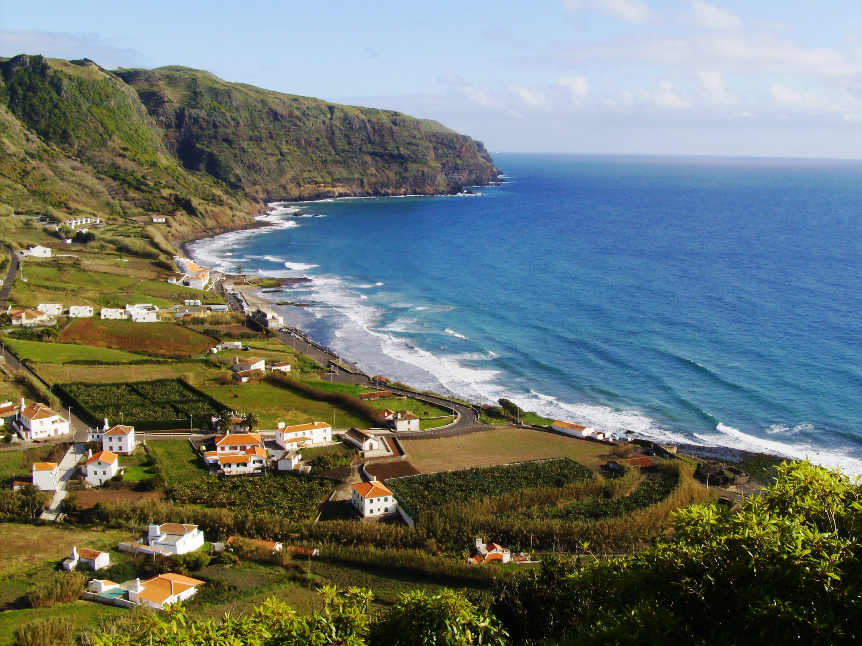 Praia Formosa, freguesia da Almagreira, ilha de Santa Maria, Açores: vista a partir do Miradouro da Maceda.